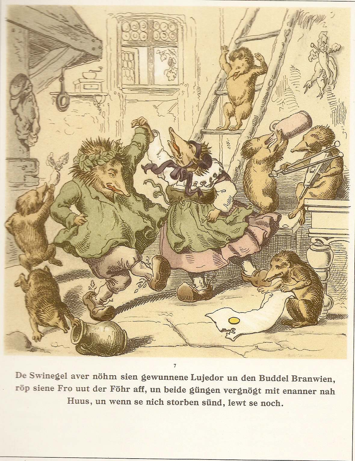 Het Wettloopen tüschen den Haasen un den Swinegel